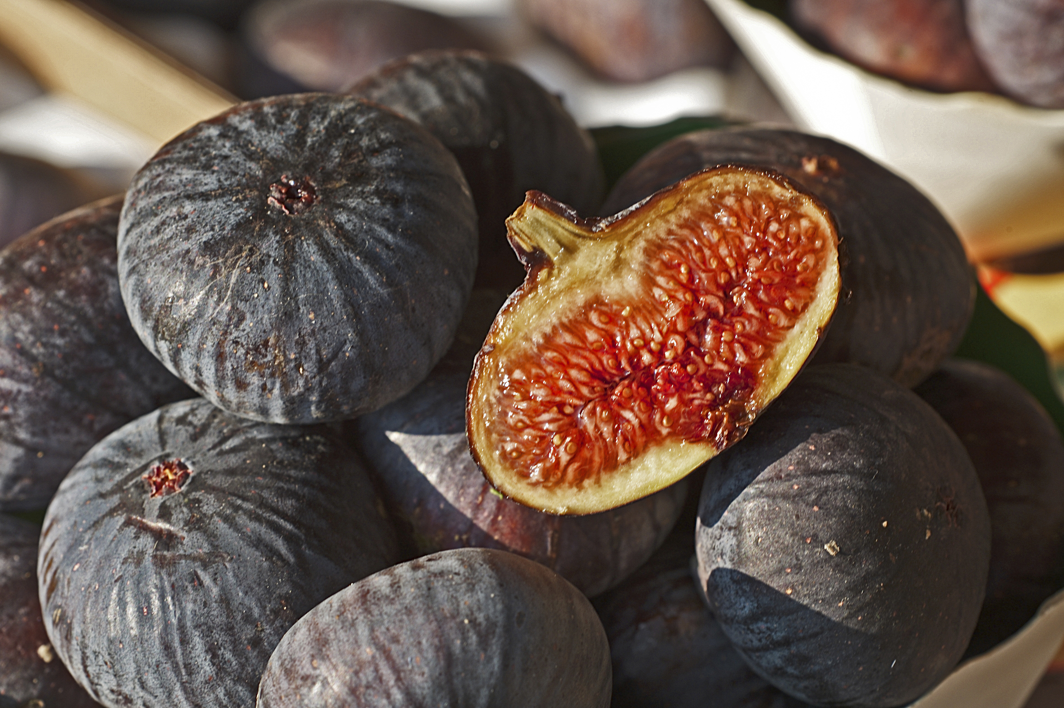 INRA, Jean Weber